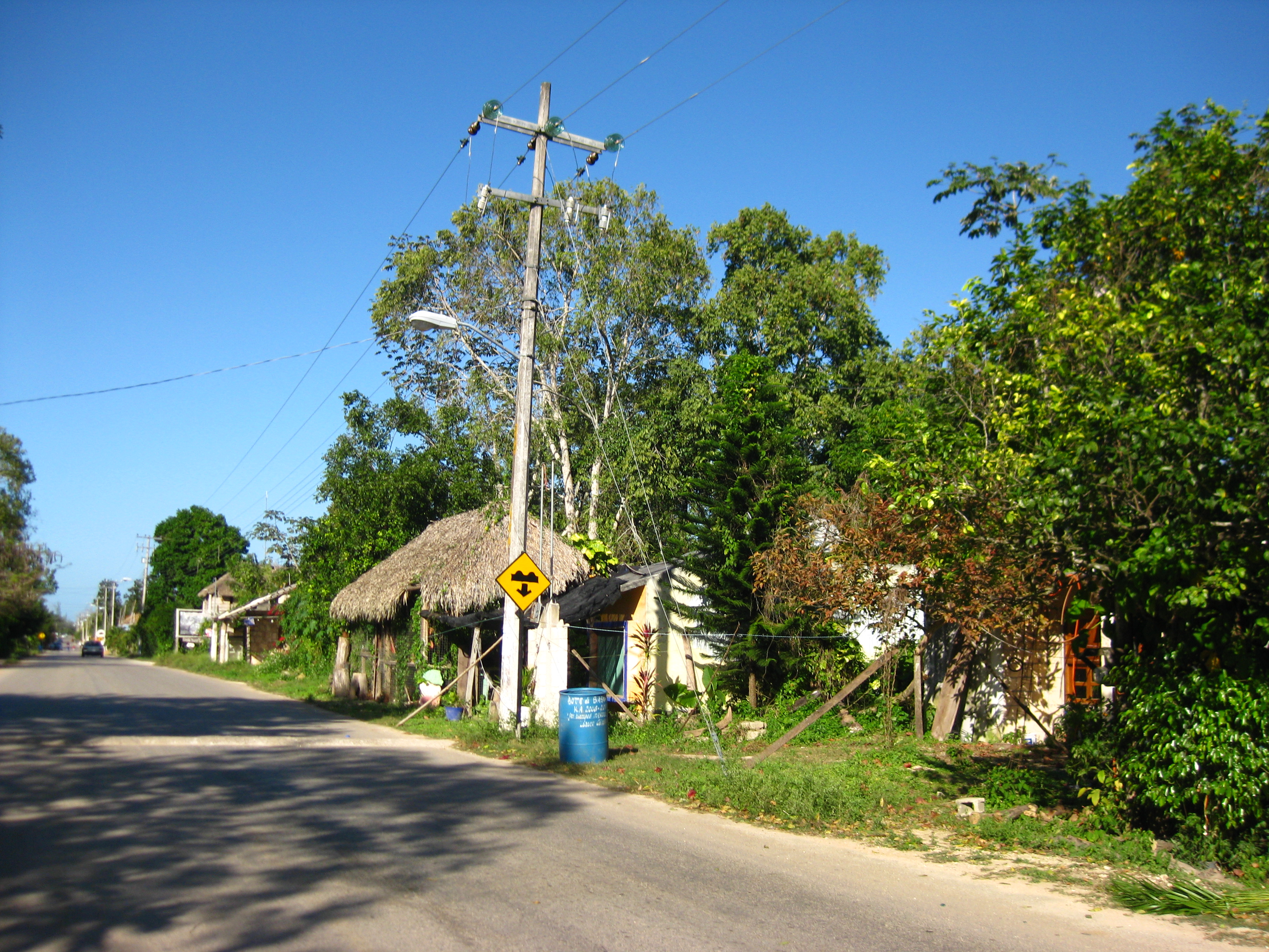 Vista de sur a norte de Solferino (Quintana Roo).